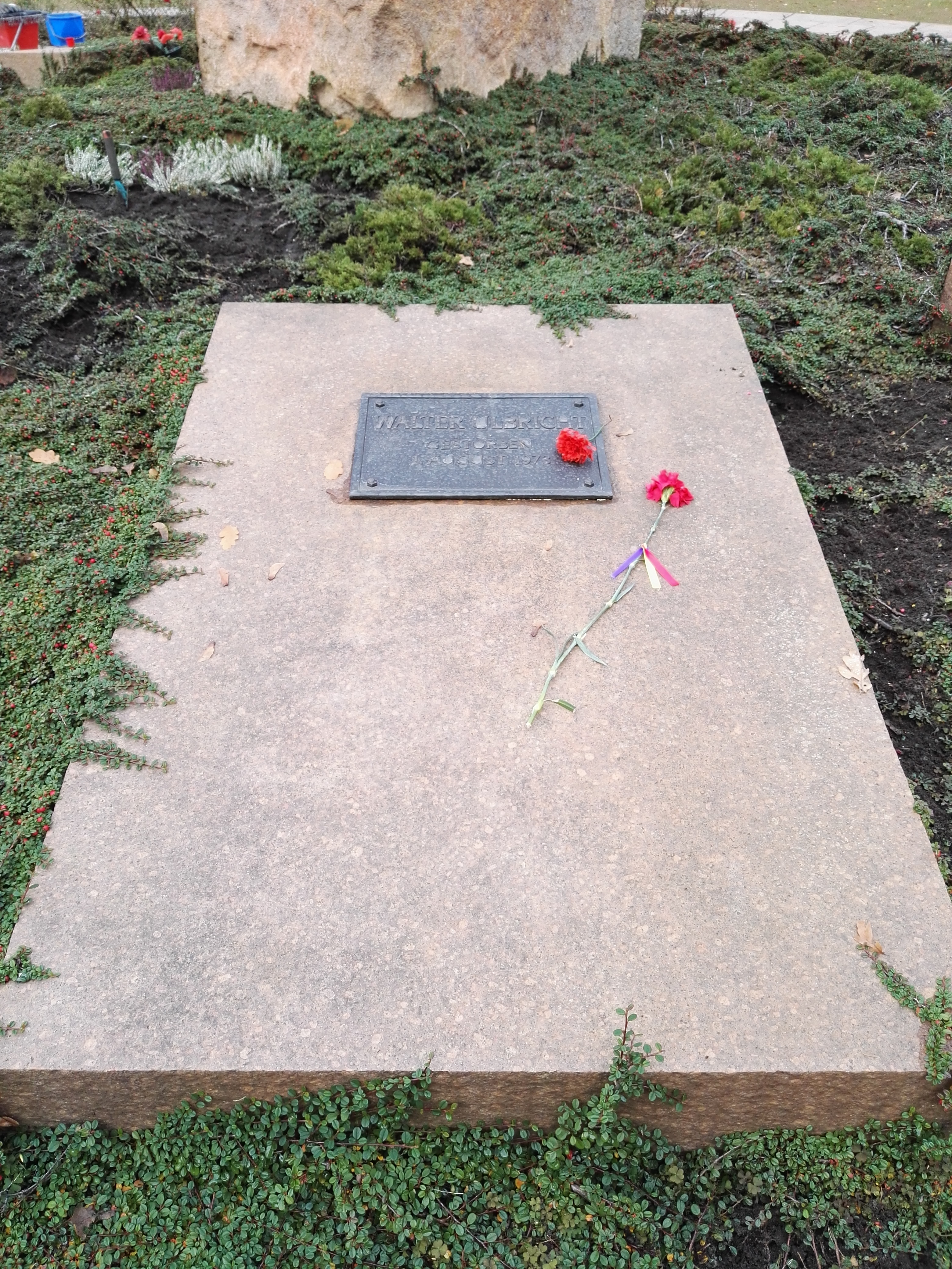 Grab von Walter Ulbricht in der Gedenkstätte der Sozialisten auf dem Zentralfriedhof Friedrichsfelde in Berlin-Lichtenberg